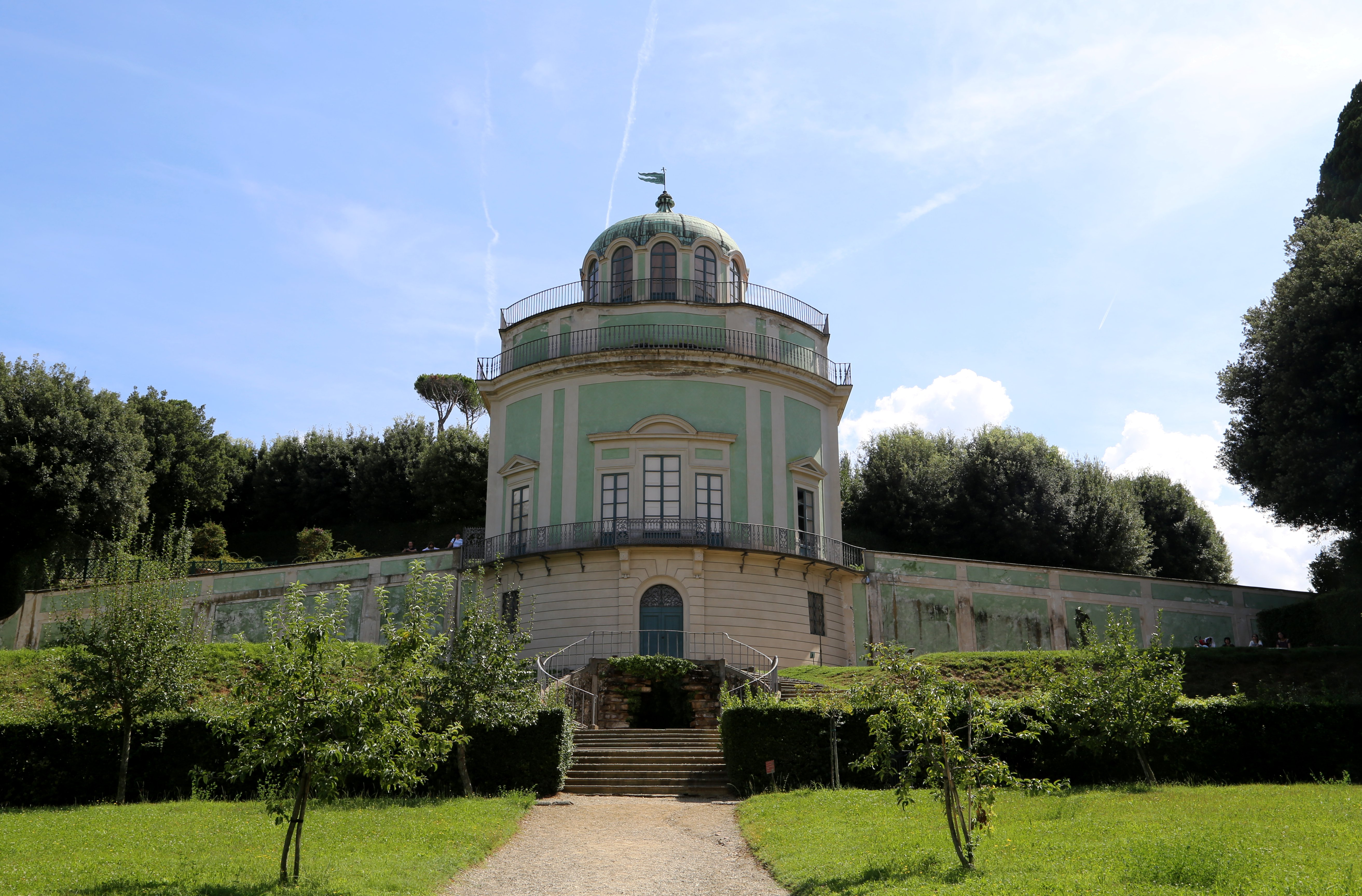 Kaffeehaus im Boboli-Garten, Florenz